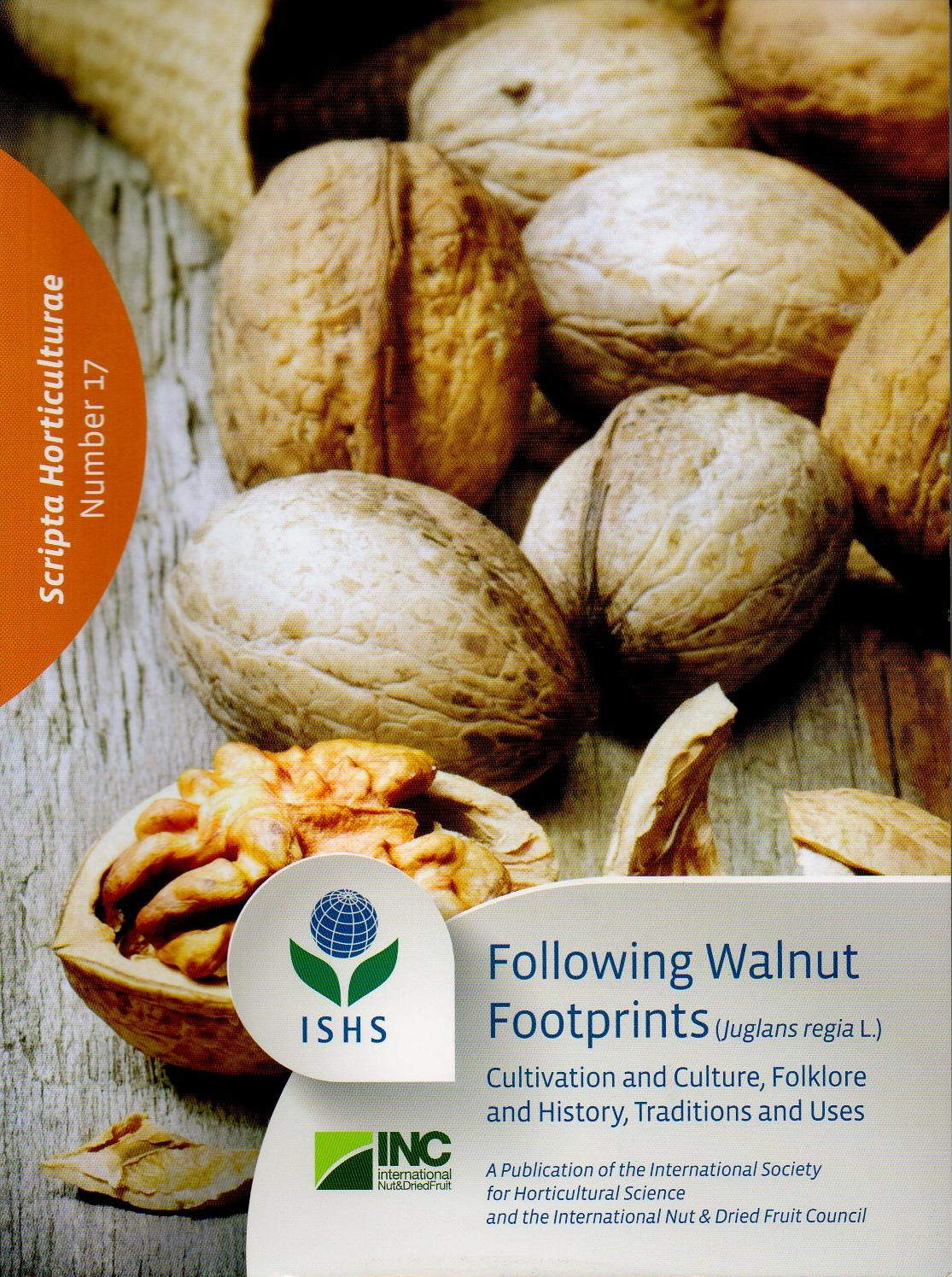 Scripta Horticulturae No17, Orzech Włoski